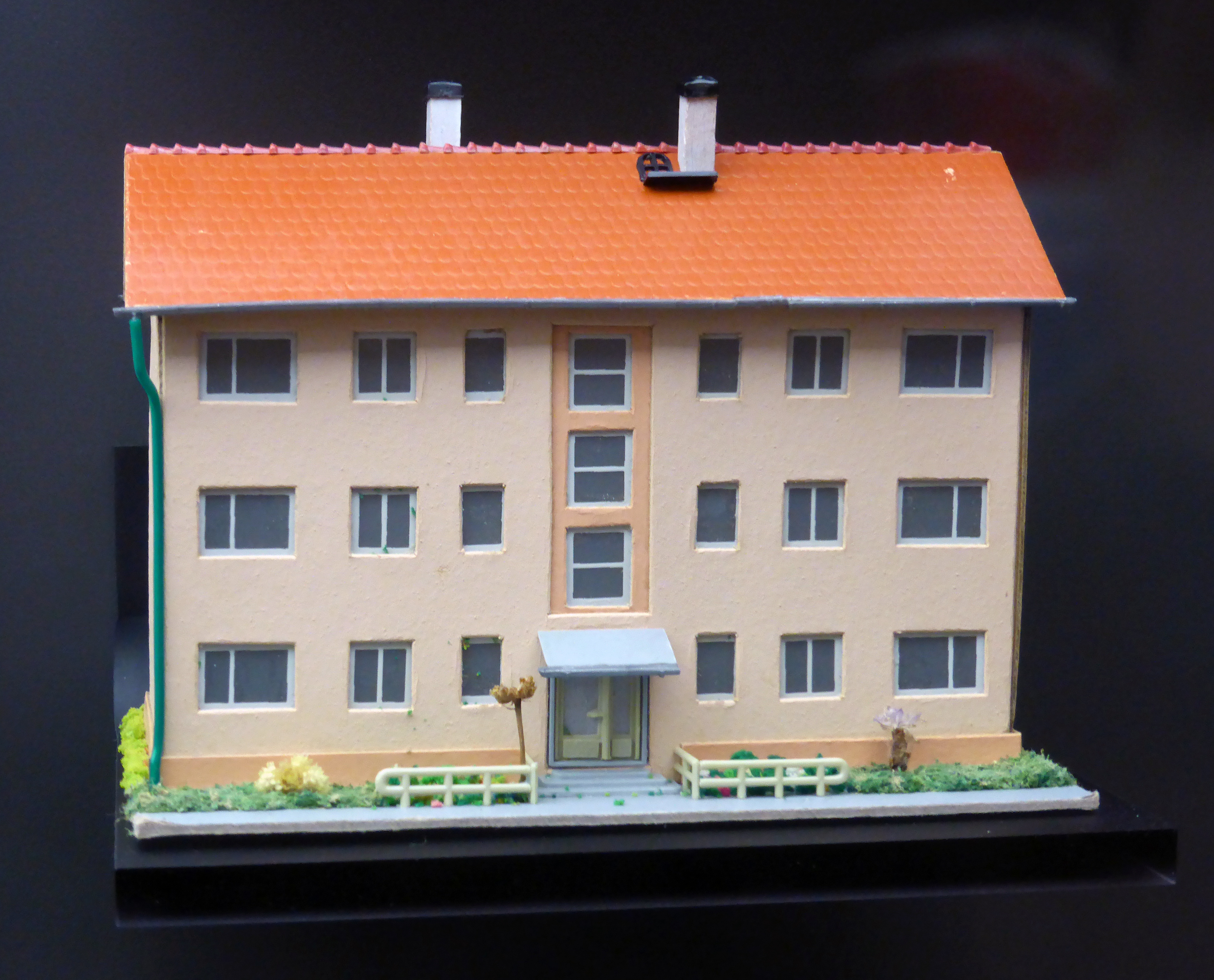 Mamos-Bausatz: AWG-Wonhnblock um 1970. Ausgestellt im Museum sächsisch-böhmisches Erzgebirge in Marienberg.